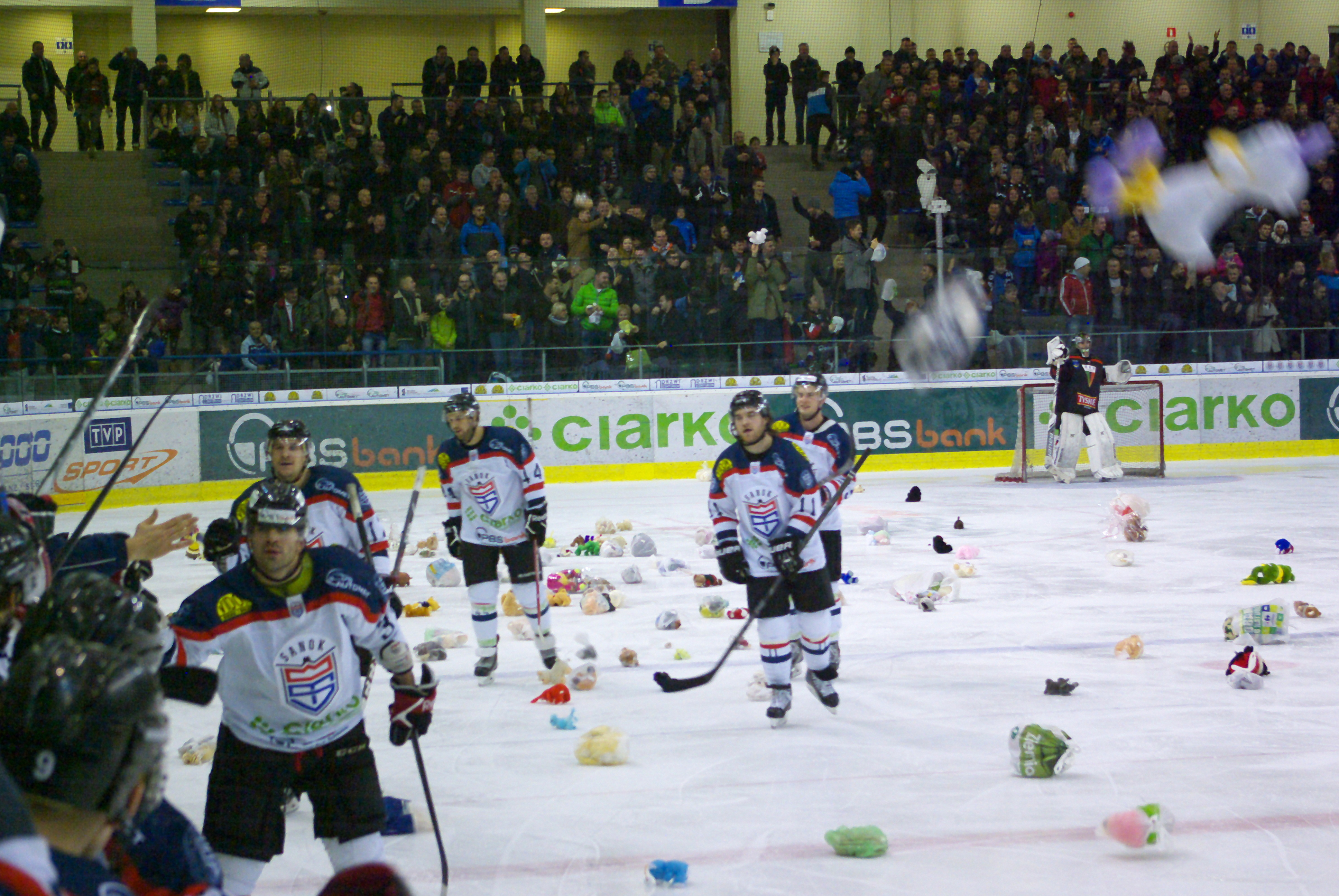 Mecz STS Sanok - GKS Tychy (Arena Sanok, 22 grudnia 2015)